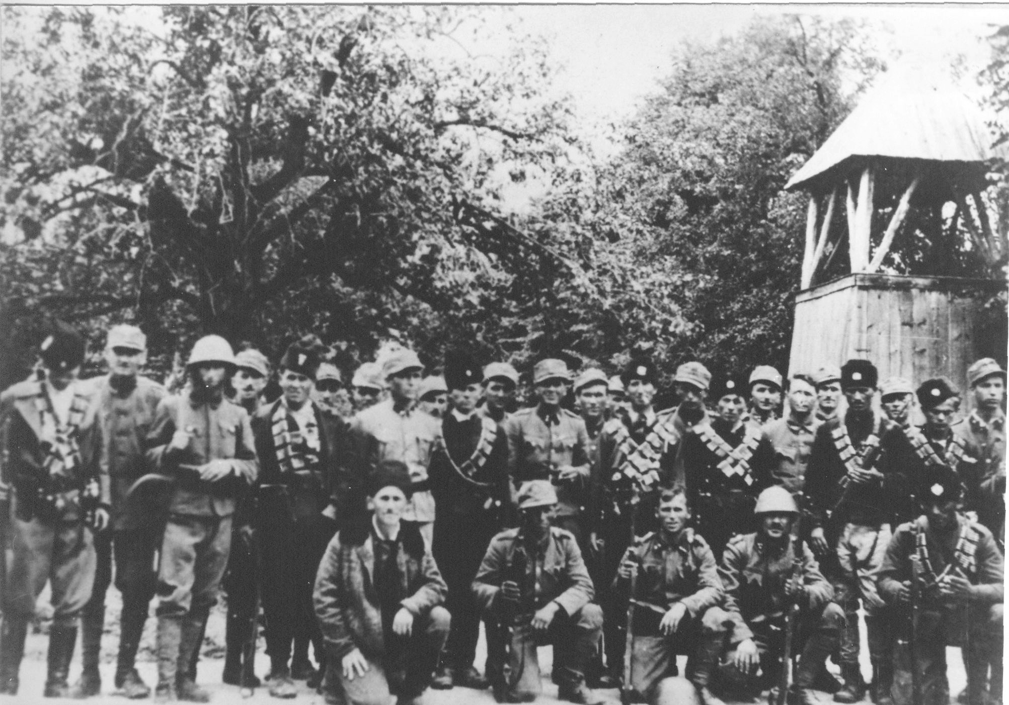 Srpskohrvatski / српскохрватски: Četnici Draže Mihailovića sa domobranima u NDH.